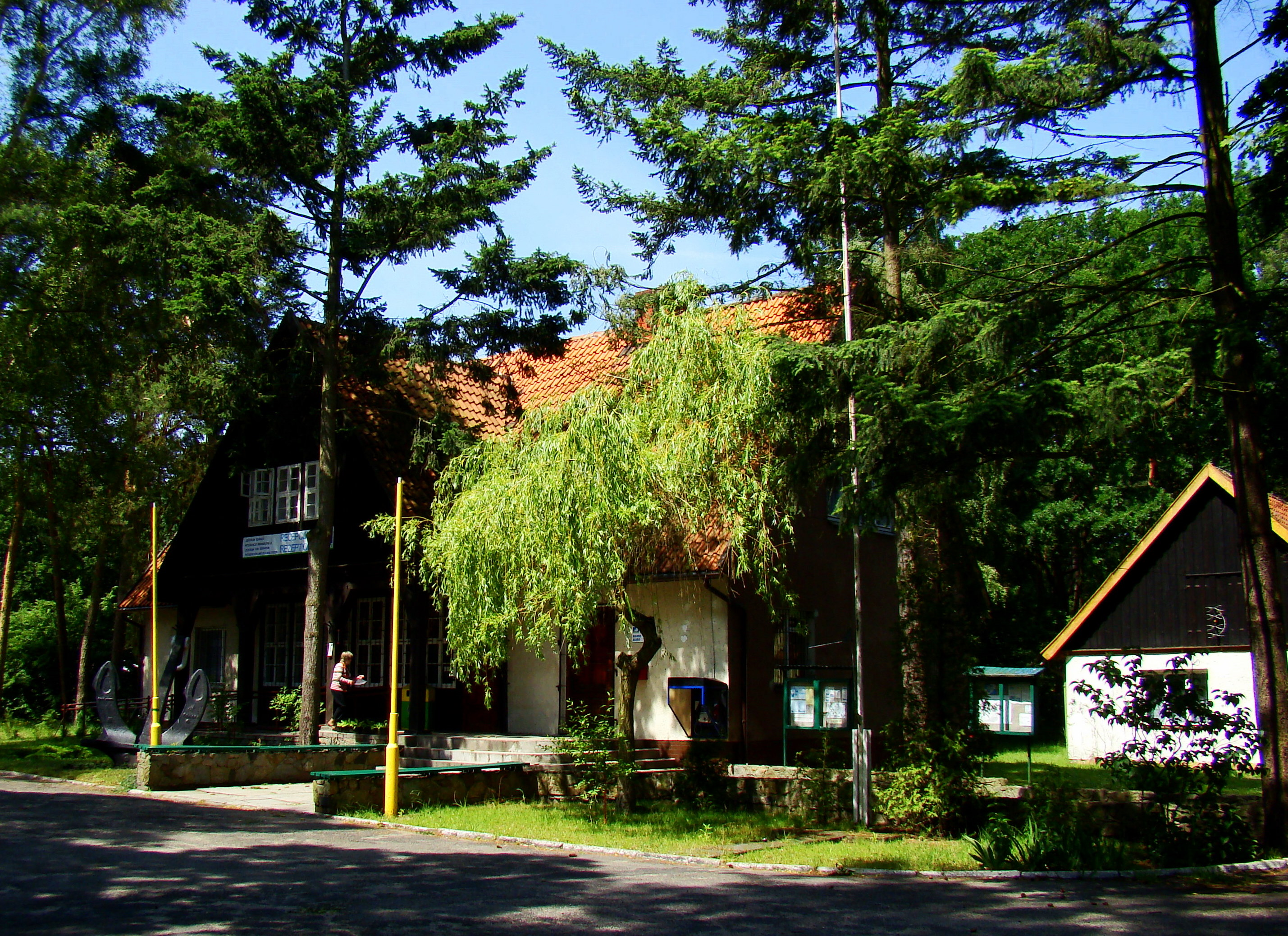 Podgrodzie-Nowe Warpno, (Województwo zachodniopomorskie), Polska